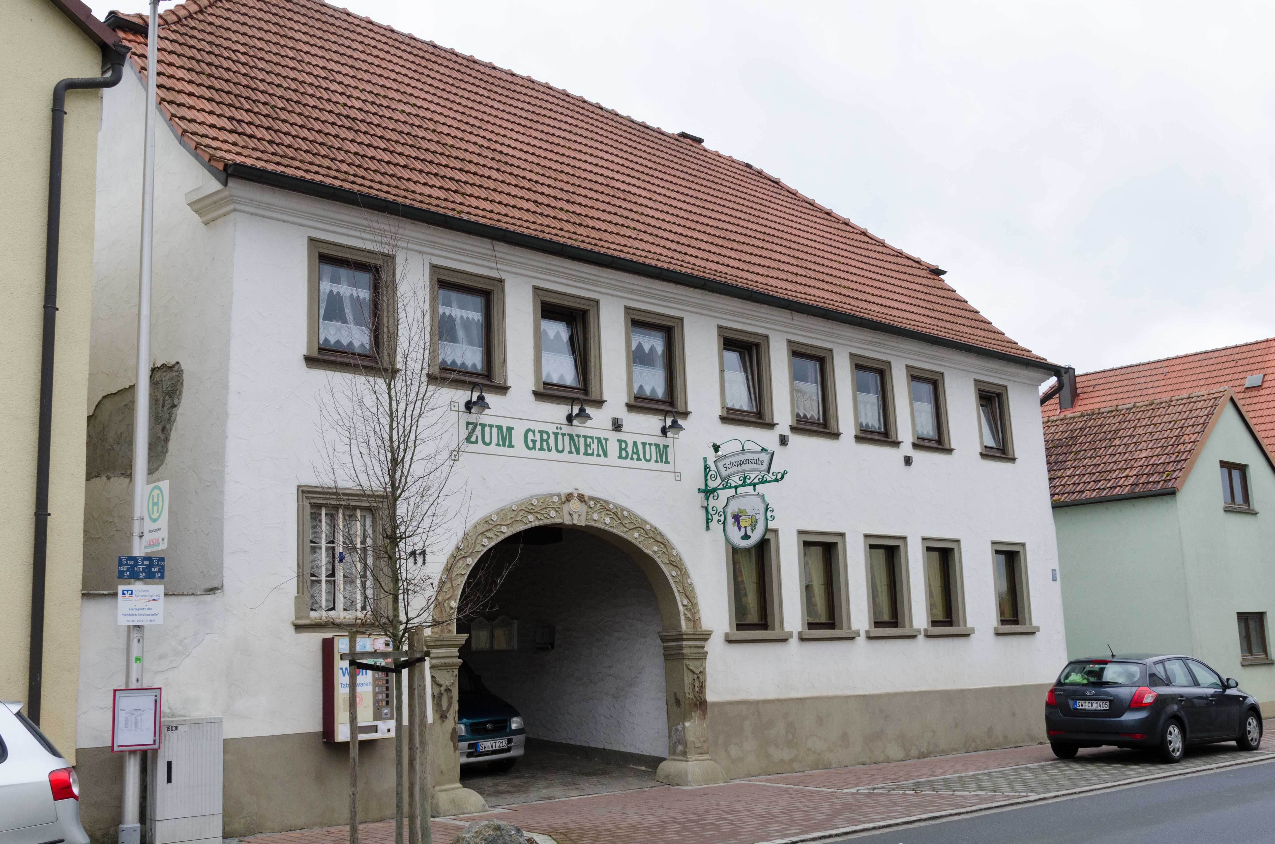 Poppenhausen, Kronungen, St.-Sebastian-Straße 11